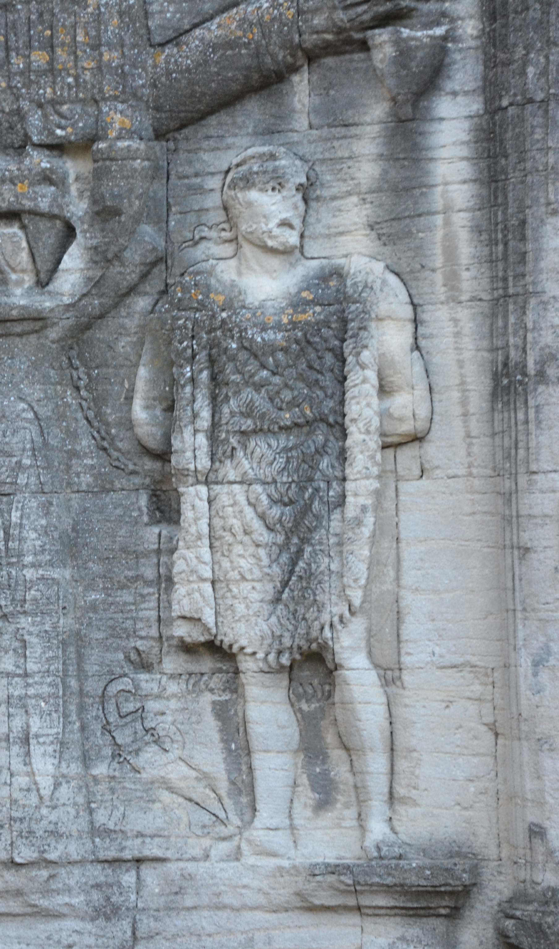 Guerreiro galaico no Arco de Carpentras segundo Joaquín Ruiz de Arbulo.